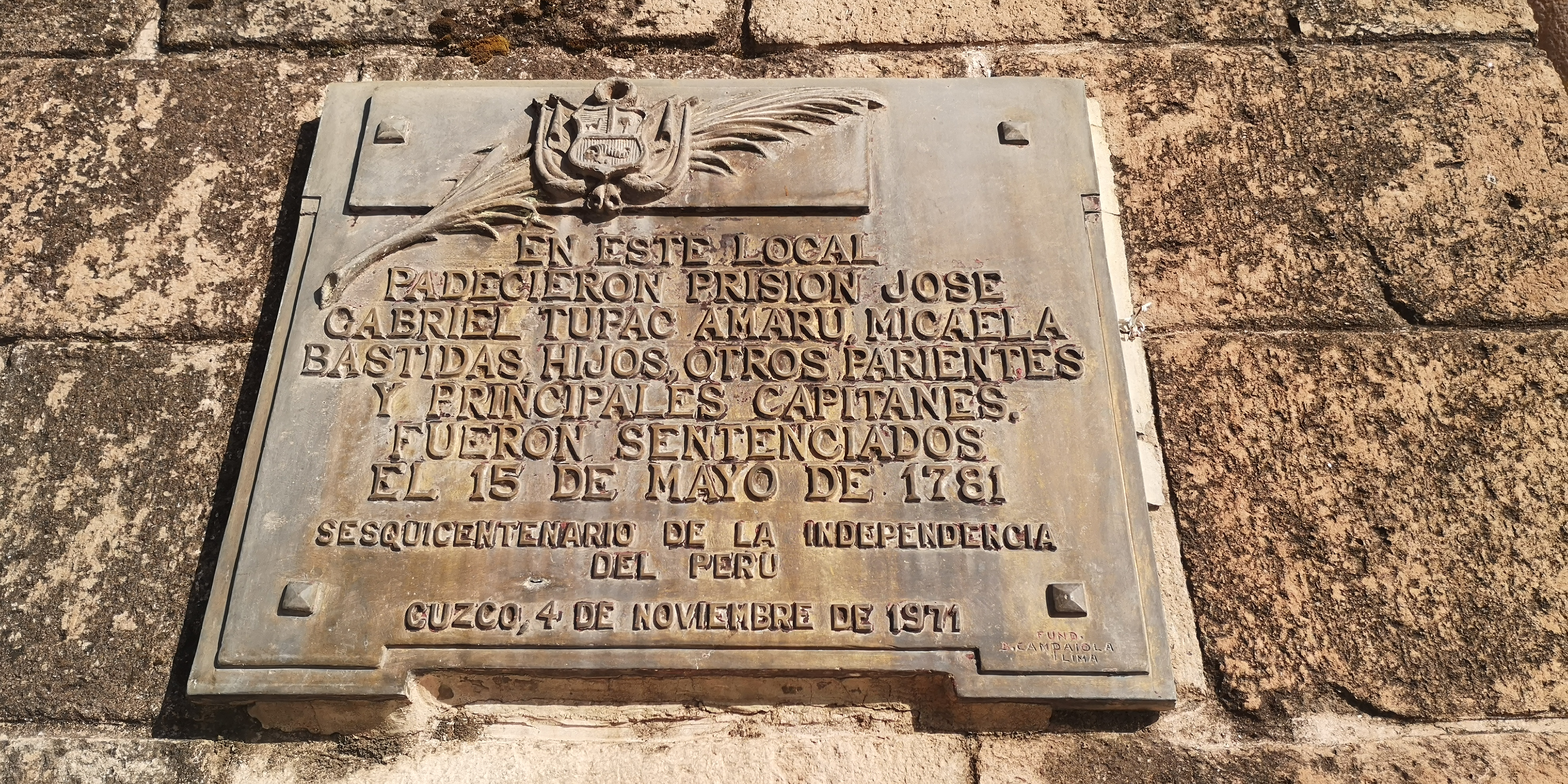 Placa ubicada en el frontis del edificio de la universidad San Antonio Abad relatando el sacrificio de Túpac Amaru II